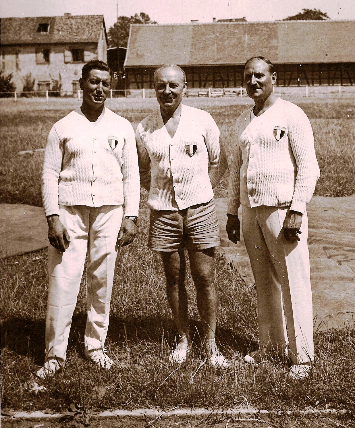 Photo de trois responsables techniques de la Fédération gymnastique et sportive des patronages de France, Strasbourg, 1936